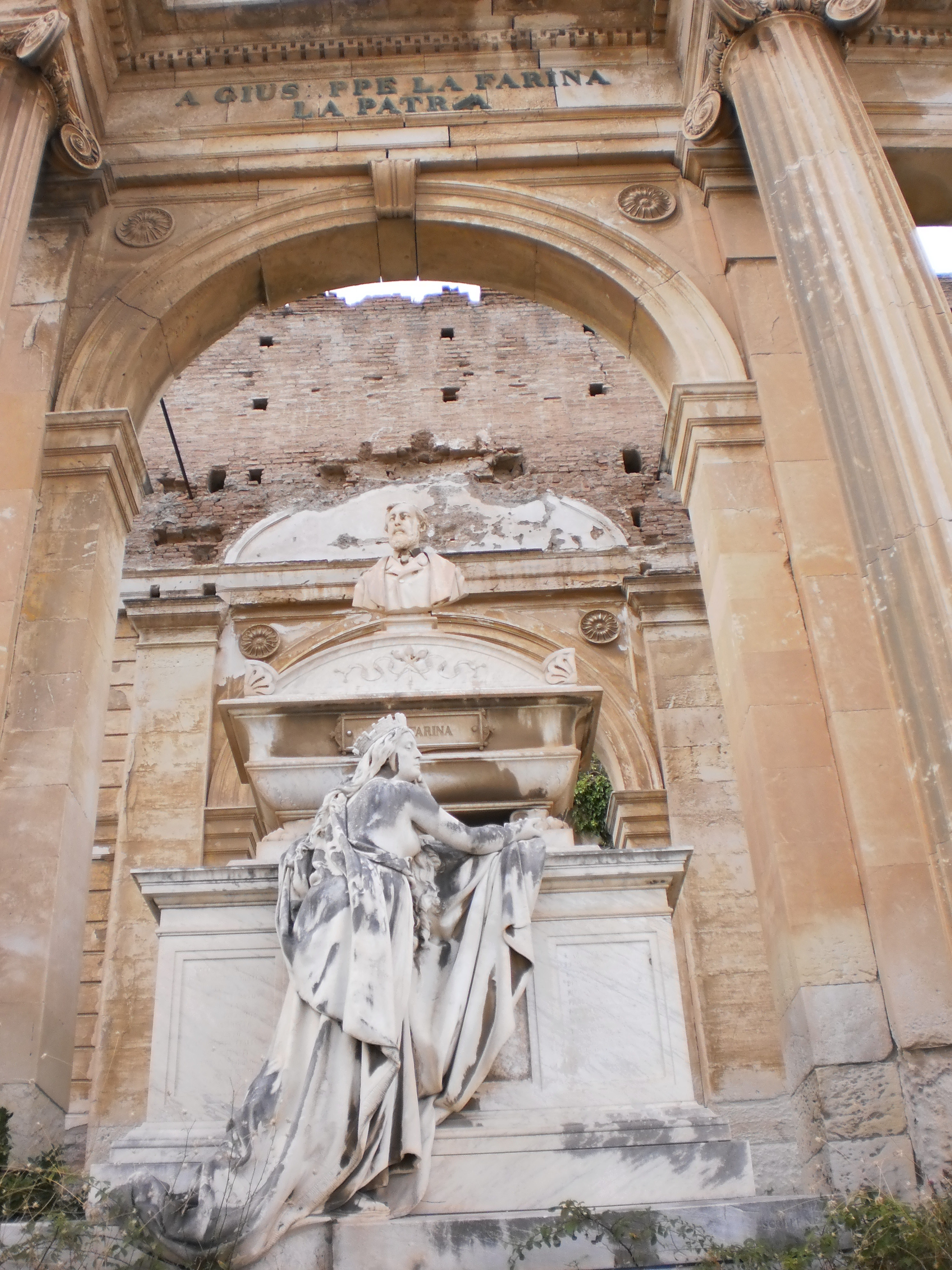 Monumento a Giuseppe La Farina